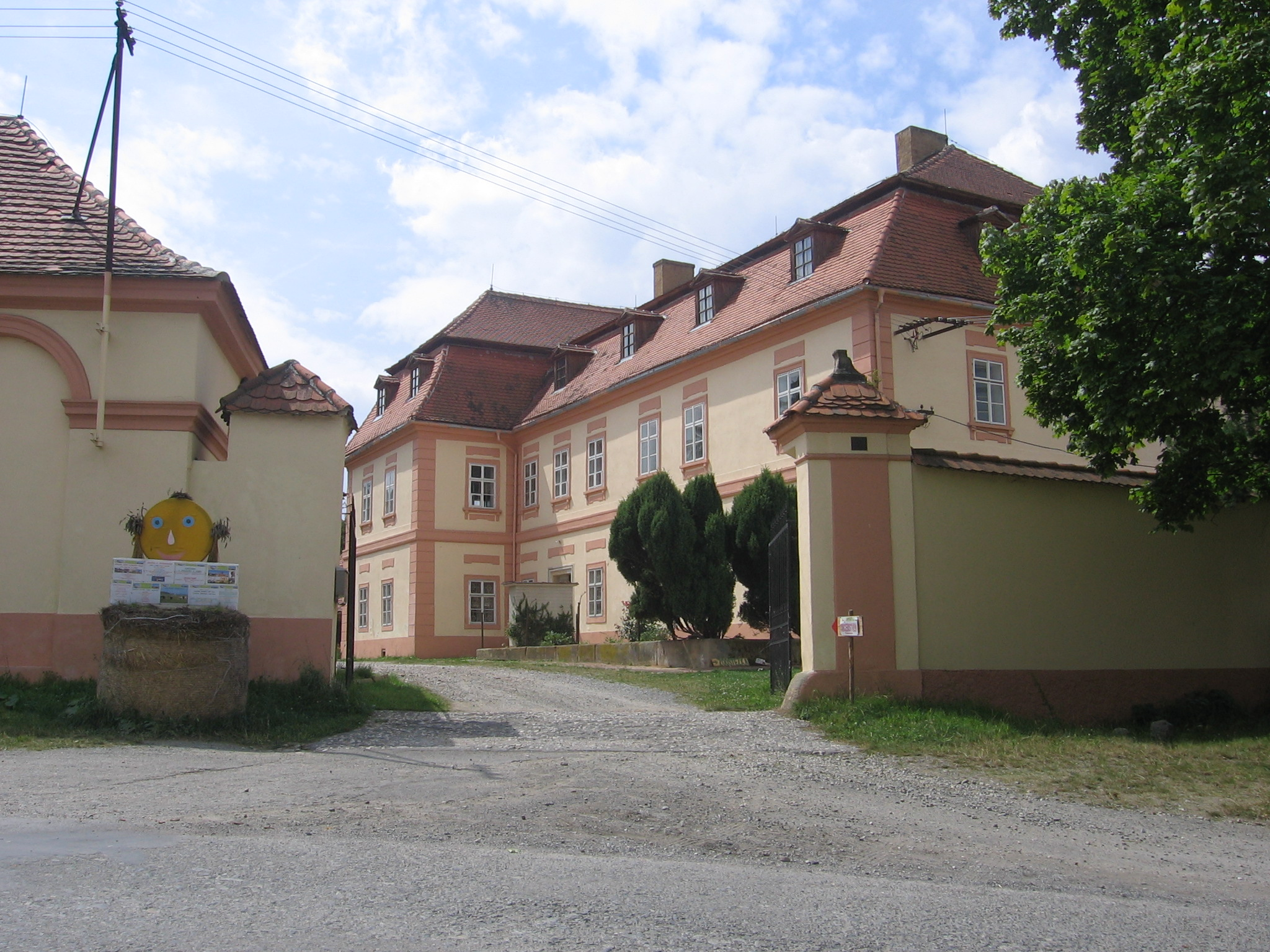 Zámek Újezd nade Mží, Újezd nade Mží 1, okr.Plzeň-sever